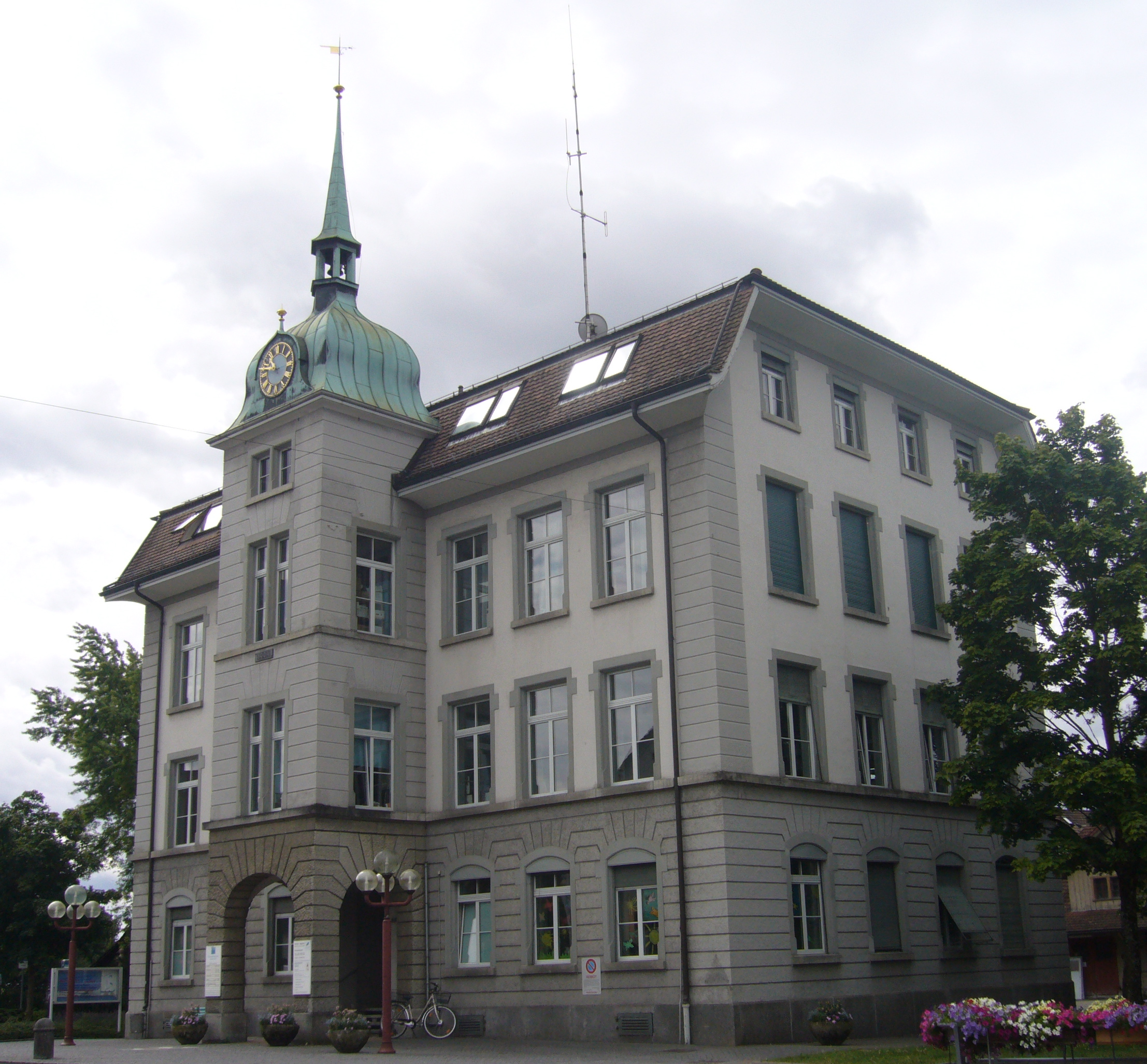 Ehemaliges Primarschulhaus Bassersdorf (erbaut 1904).